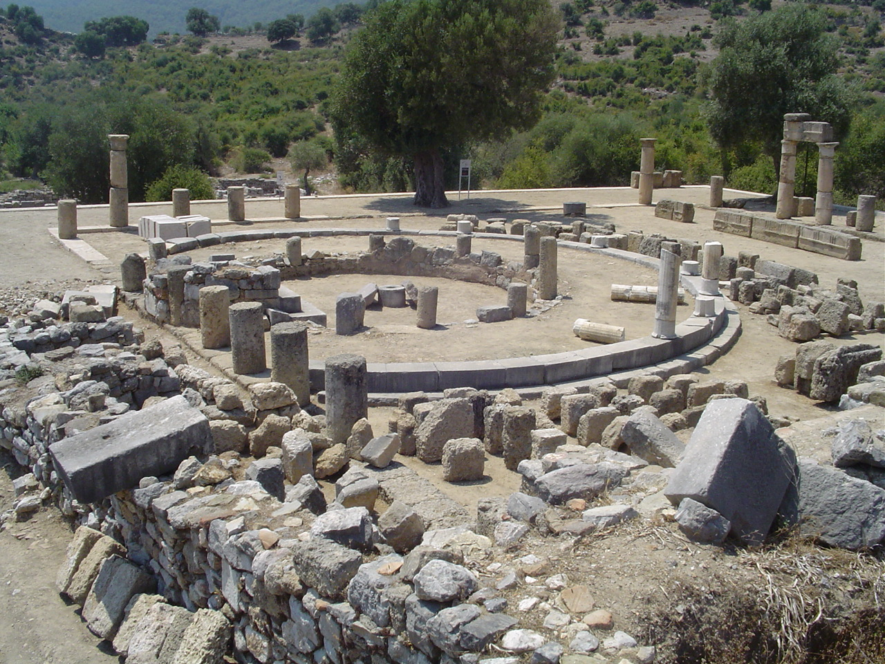 Kaunos